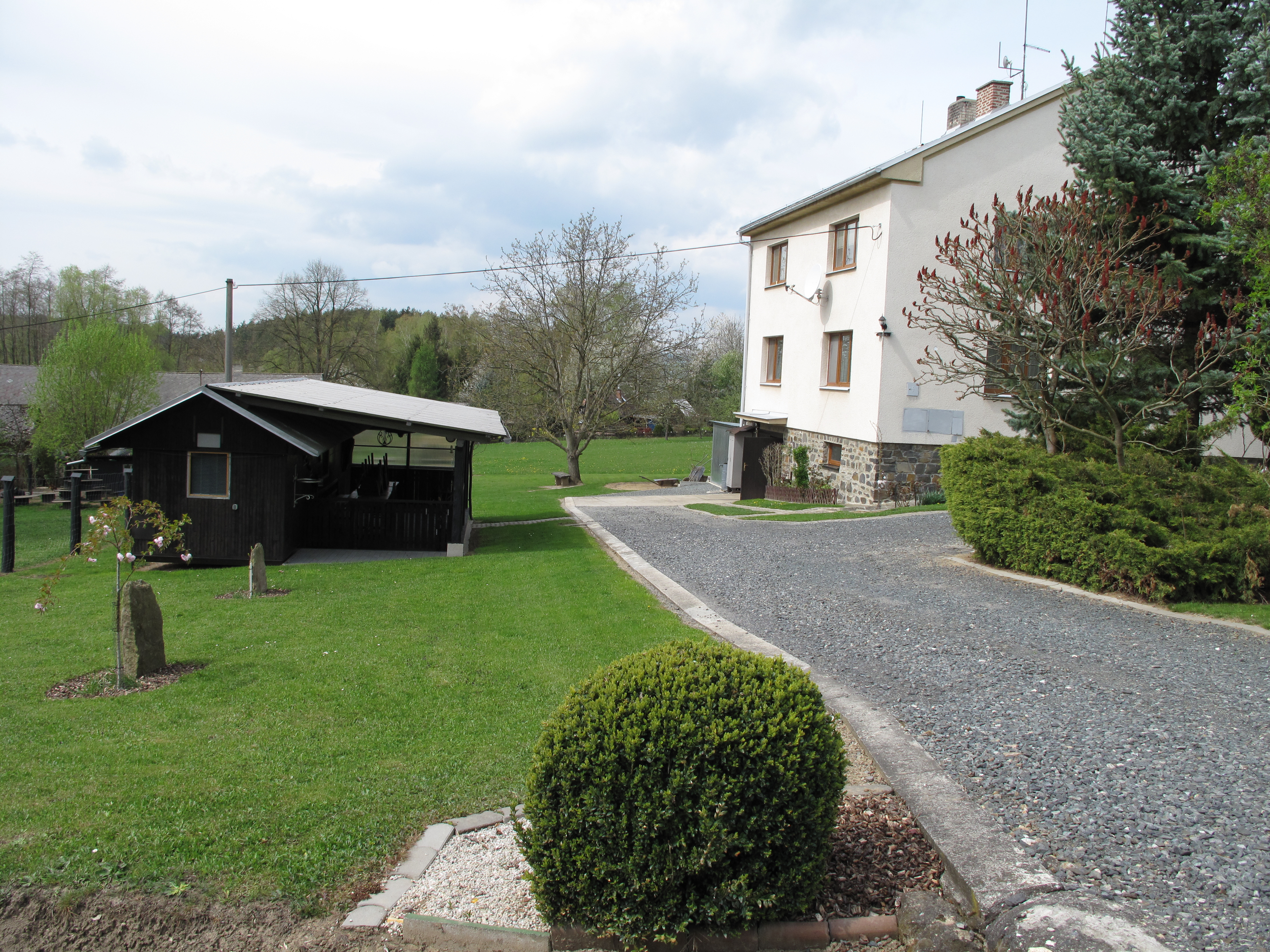 Rozpáralka. Okres Klatovy, Česká republika.